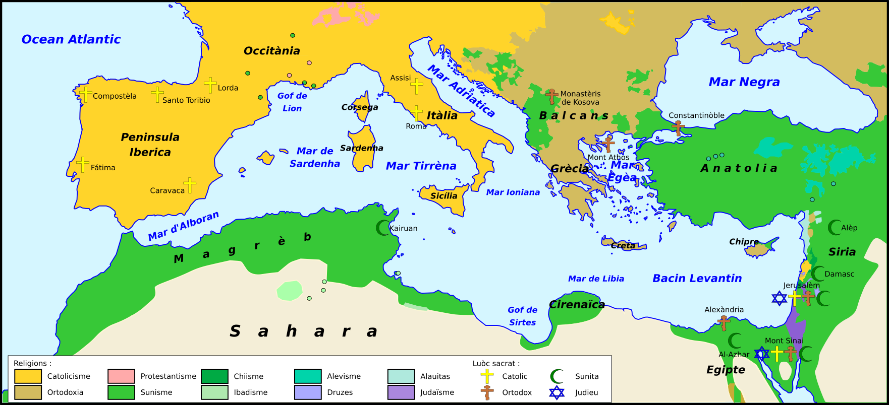 Religions principalas dau mond mediterranèu au començament dau sègle XXI.